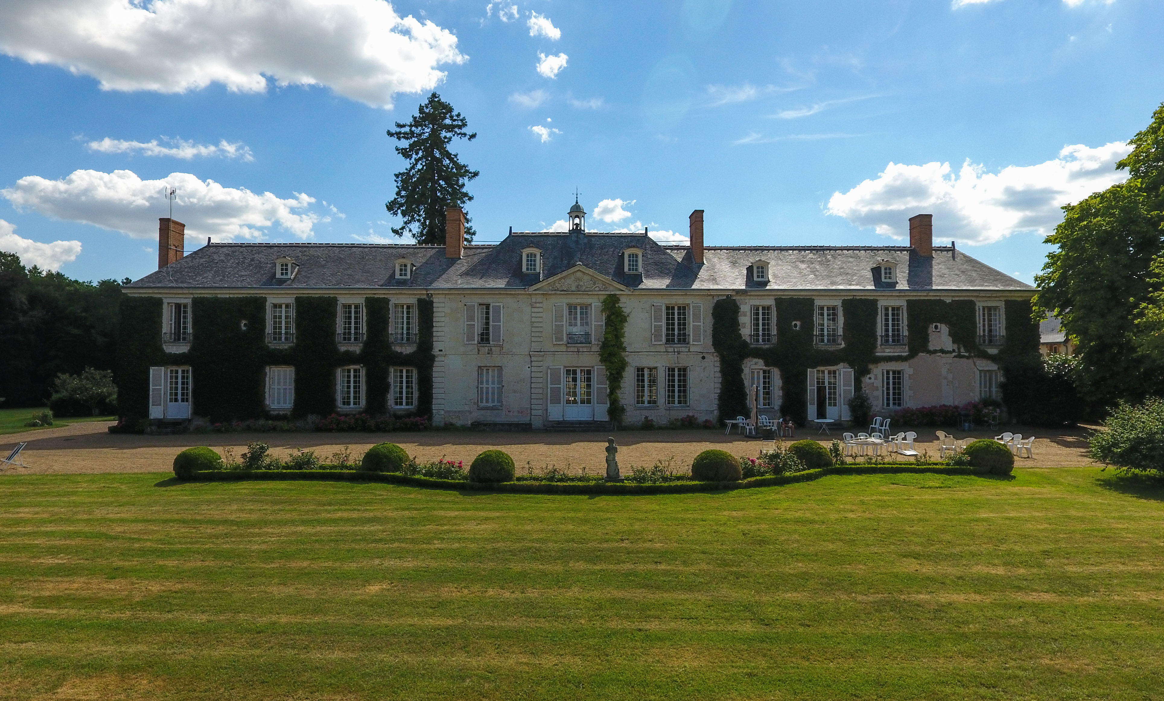 Photo prise par un drone en 2017.